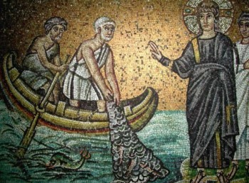 Mosaic in Basilica of Sant'Apollinare Nuovo.